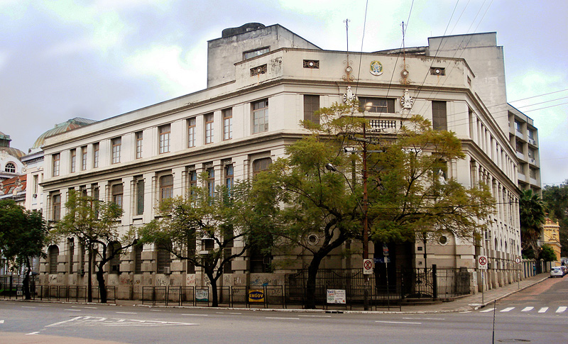 Instituto Eletro-Técnico, um prédio histórico da Universidade Federal do Rio Grande do Sul, Porto Alegre, Brasil.